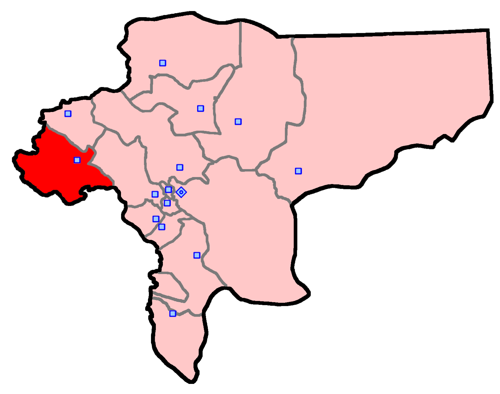 حوزهٔ انتخاباتی فریدن و چادگان و فریدون‌شهر برای انتخابات مجلس شورای اسلامی